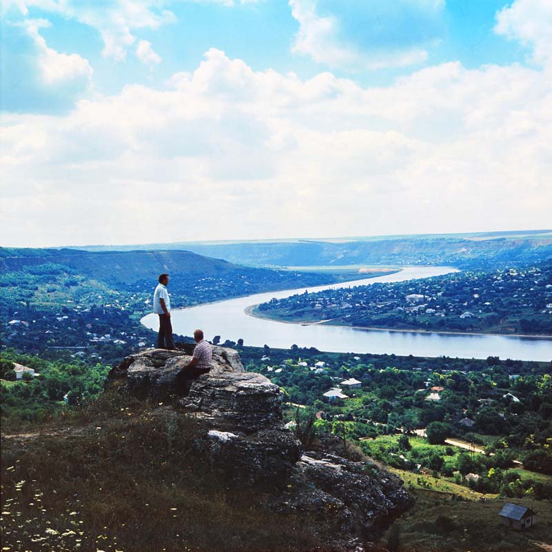 Camenca district.